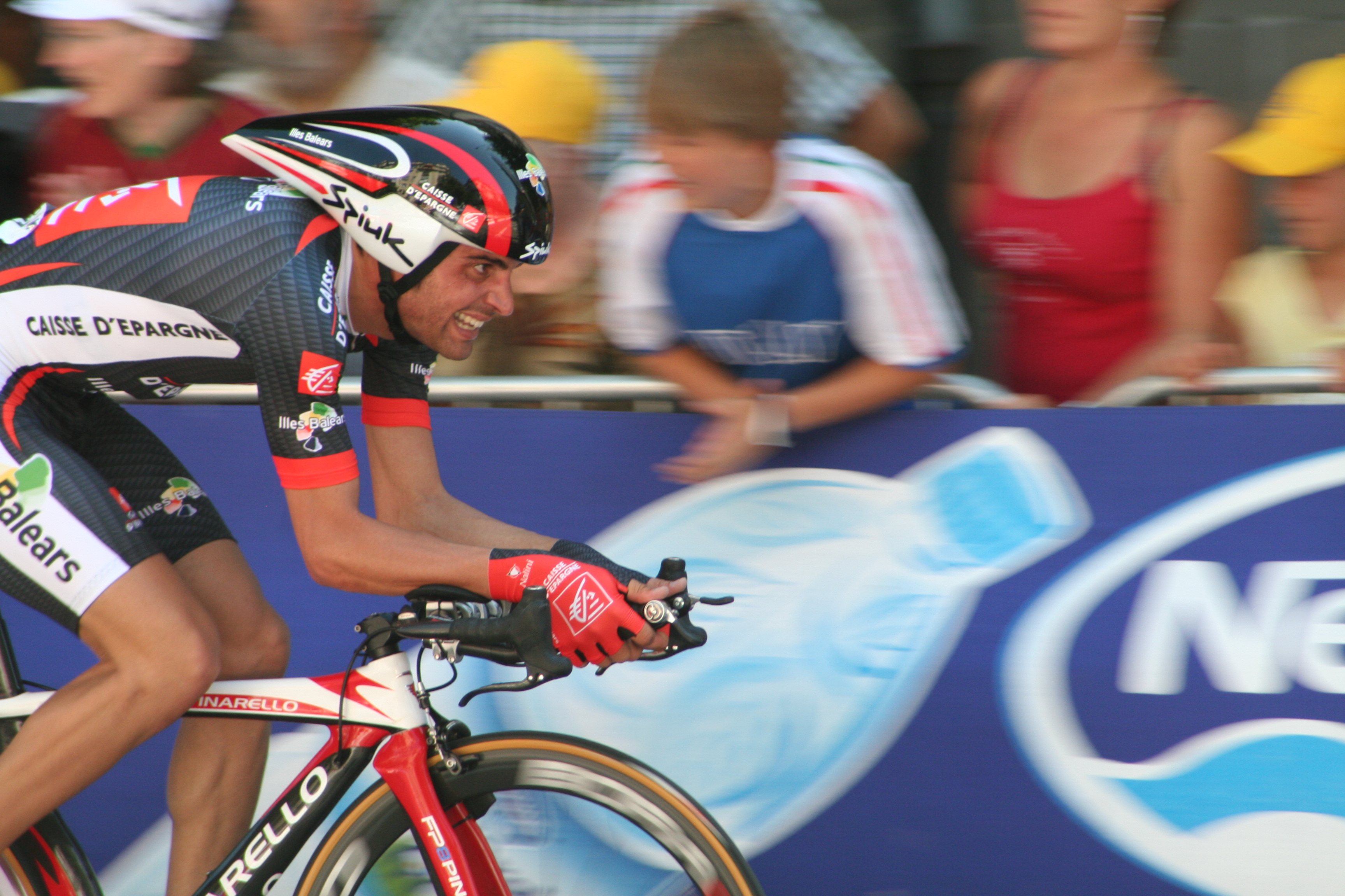 Ein Fahrer des Teams Caisse d'Epargne im Rausch der Geschwindigkeit